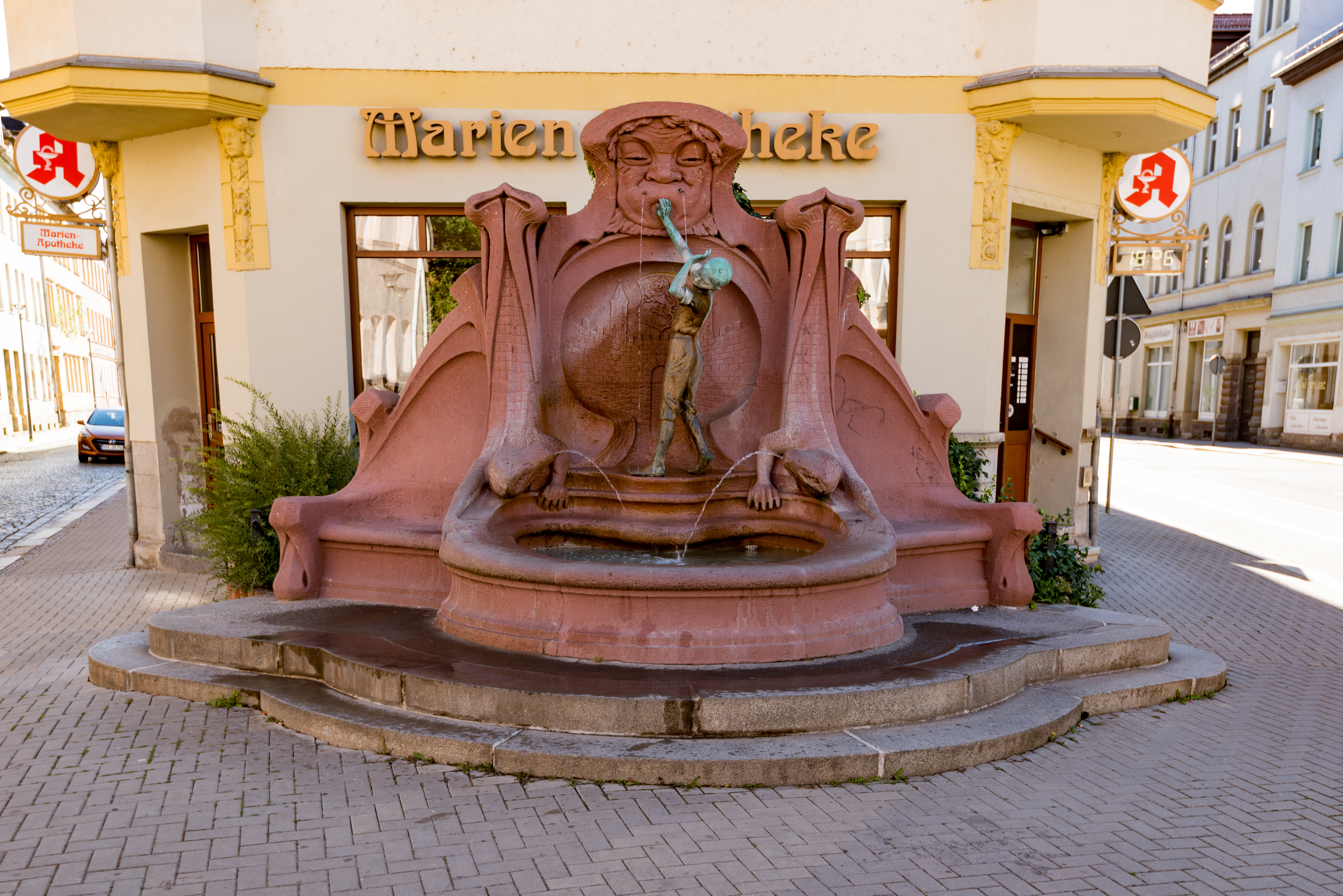 Weißenfels, Beuditzstraße 2, Brunnen